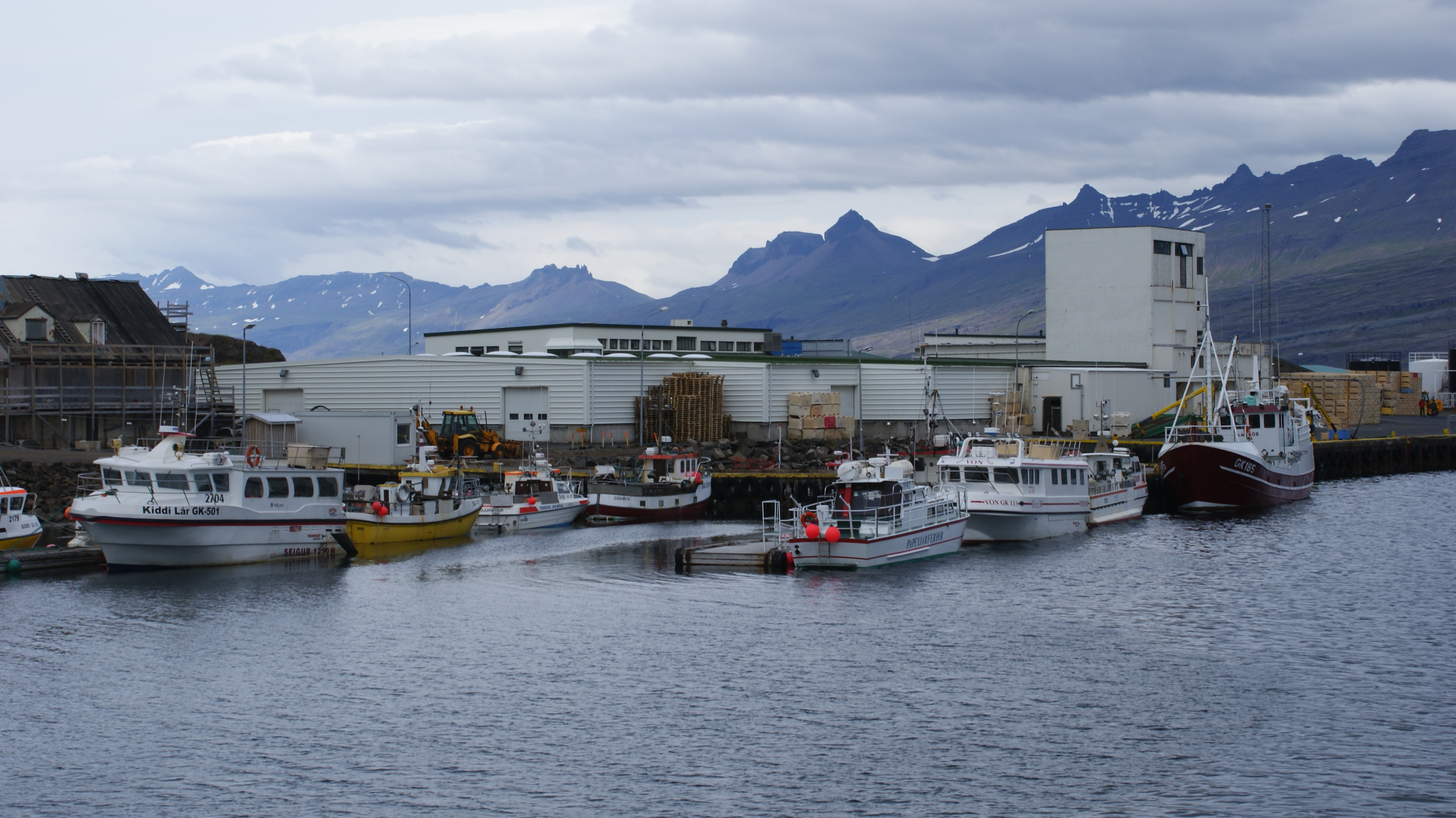 Djúpivogur, Iceland.